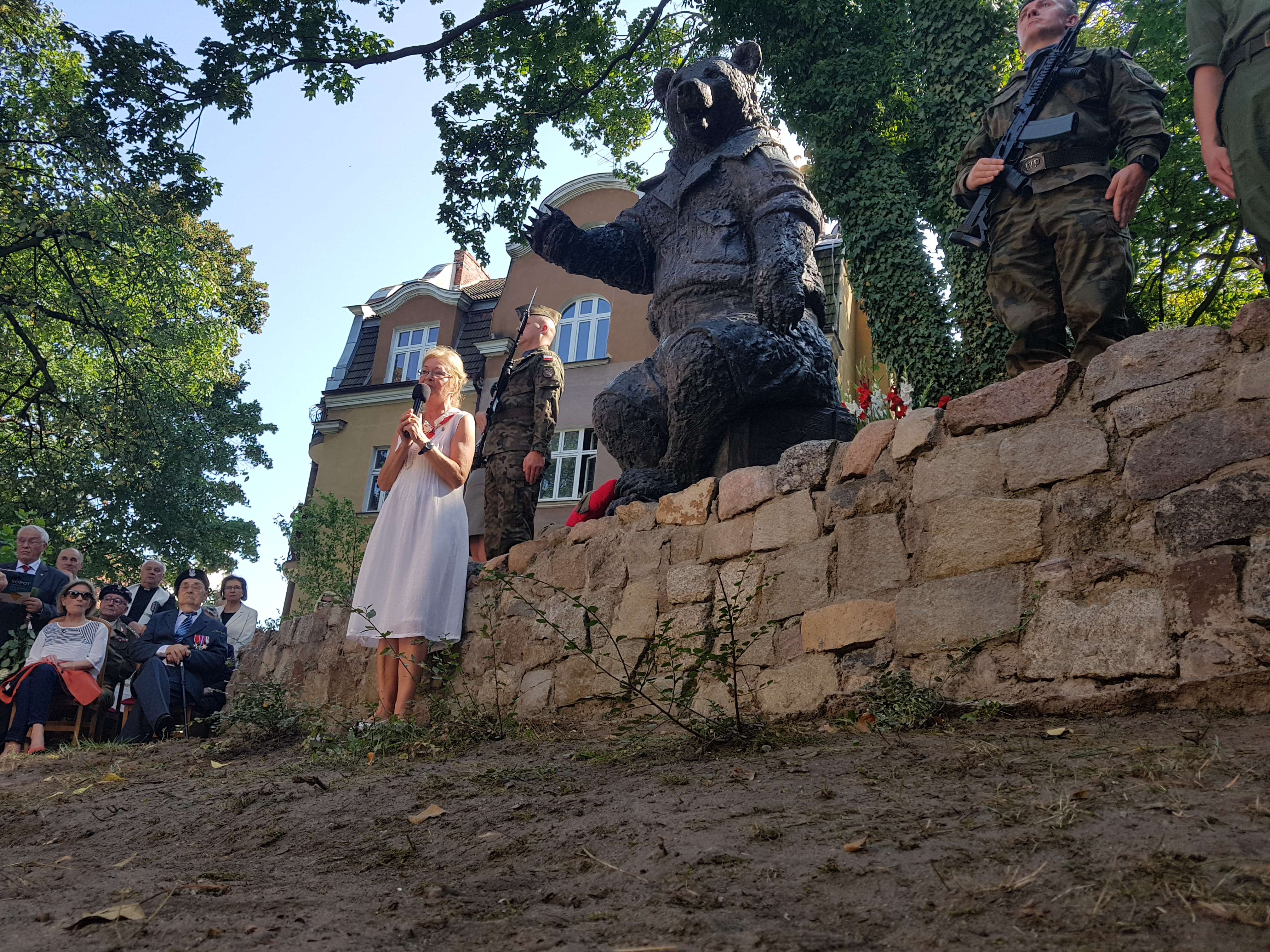 Pomnik powstał z inicjatywy Ewy Rakowskiej-Eggar (na zdjęciu podczas uroczystego odsłonięcia), założycielki Fundacji na Rzecz Budowy Pomnika Misia Wojtka w Sopocie, sopocianki zamieszkałej w Londynie.